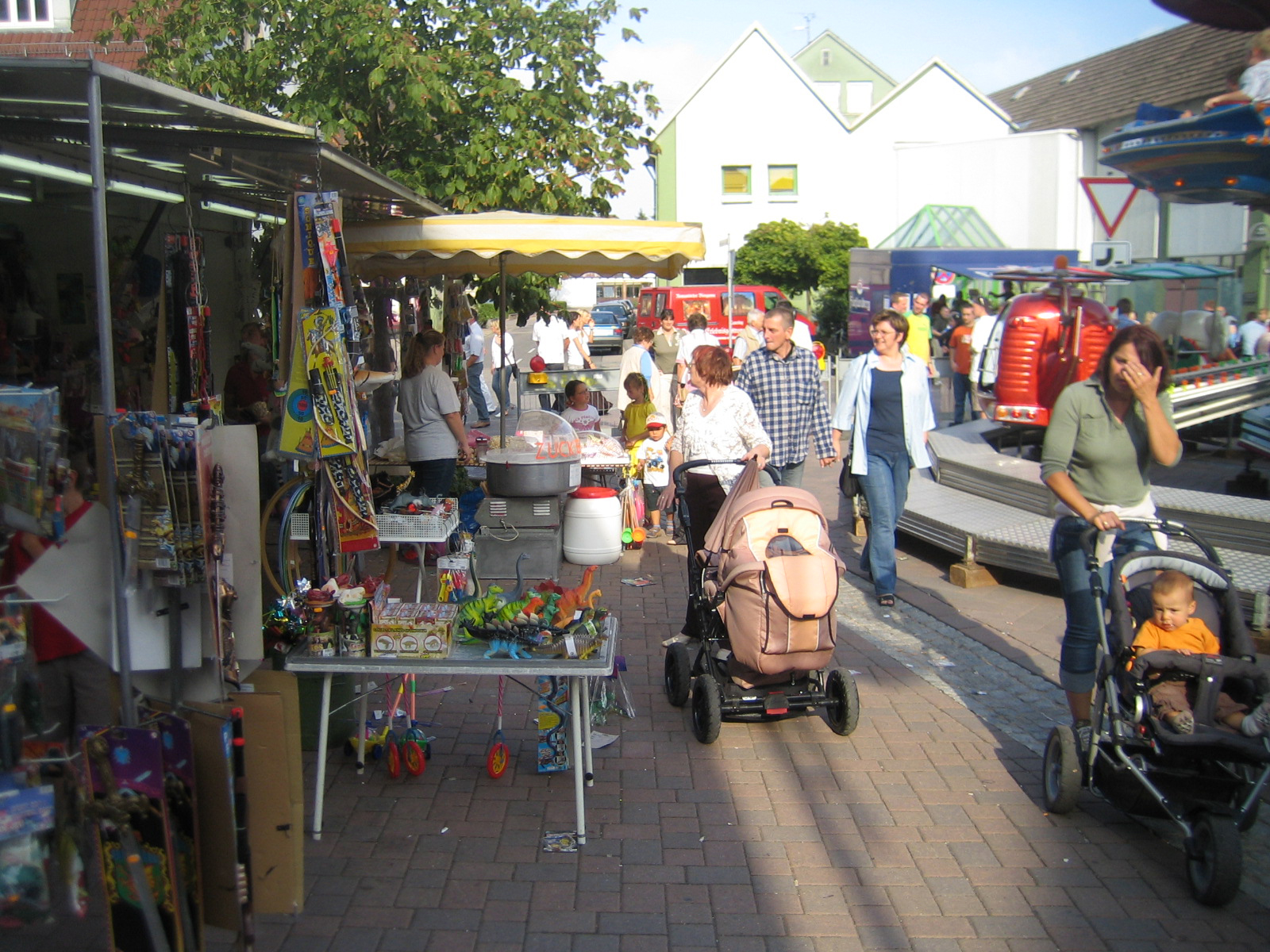 Kirchweih in Eschelbronn